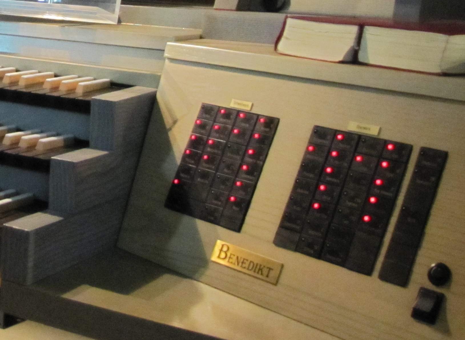 Spieltisch Marten Großaufnahme der Registertaster rechte Seite